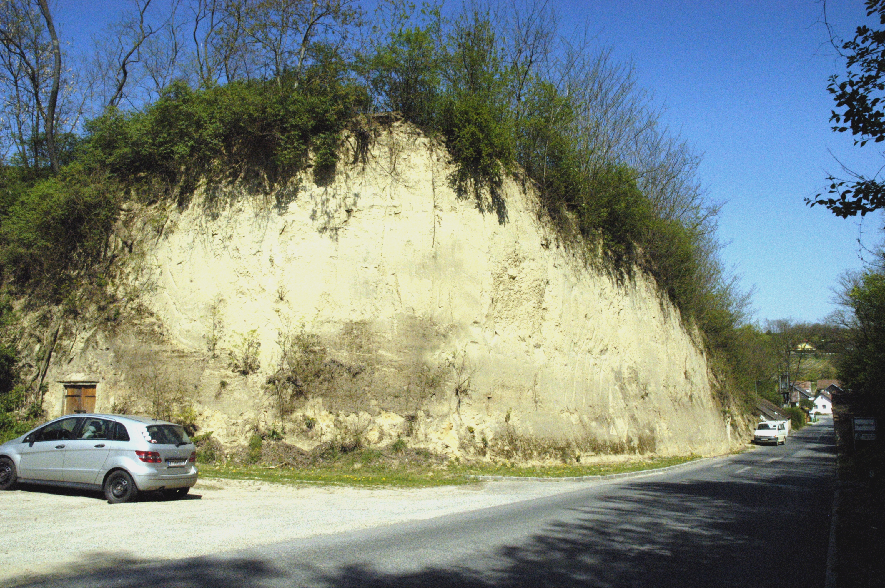 Lössformation am Wagram in der Nähe von Ruppersthal